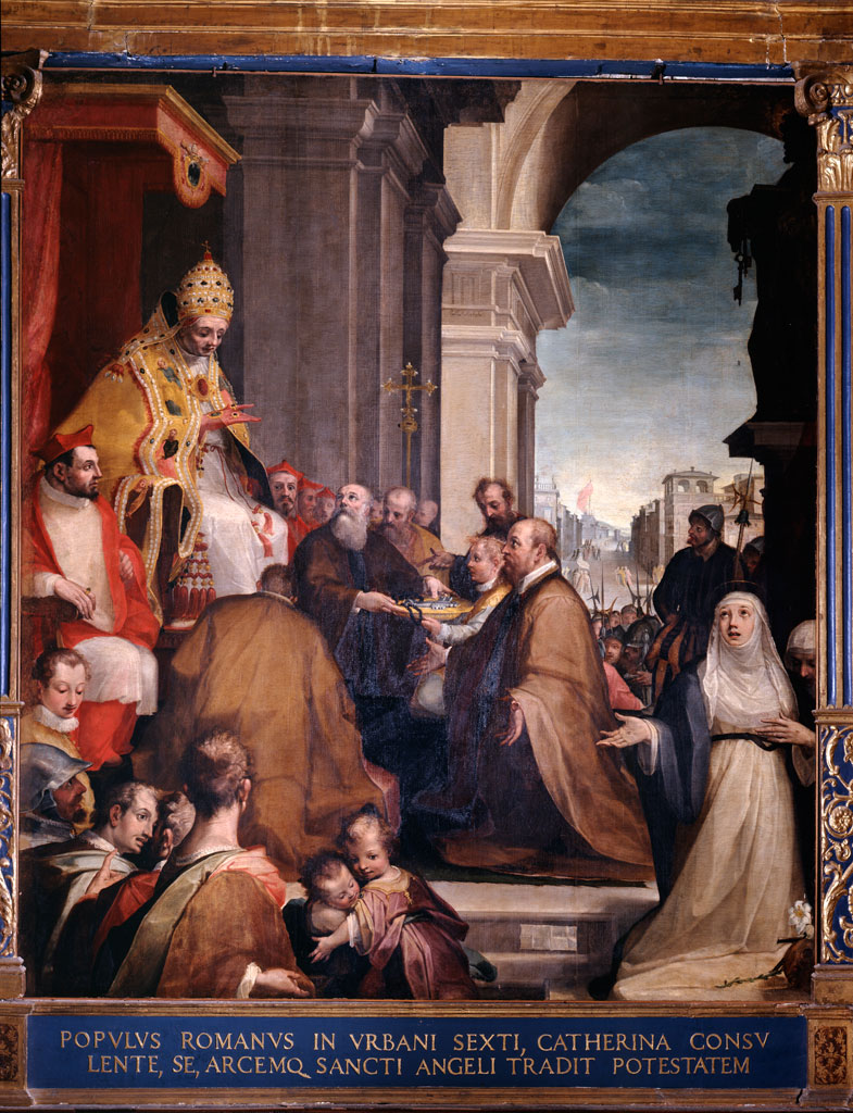 Spain: Alessandro Casolani, Entrega de las llaves del Castillo San ángel al Papa Urbano VI, 1582-1583.